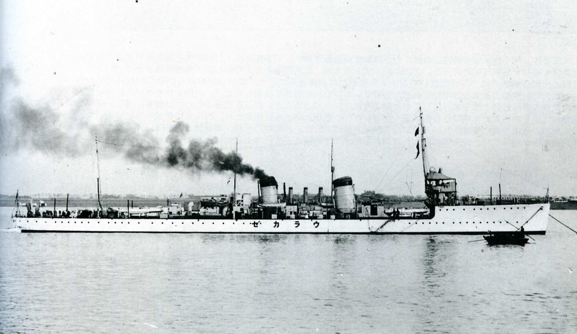 Japanese destroyer Urakaze at Wuhan, China in 1930-1933